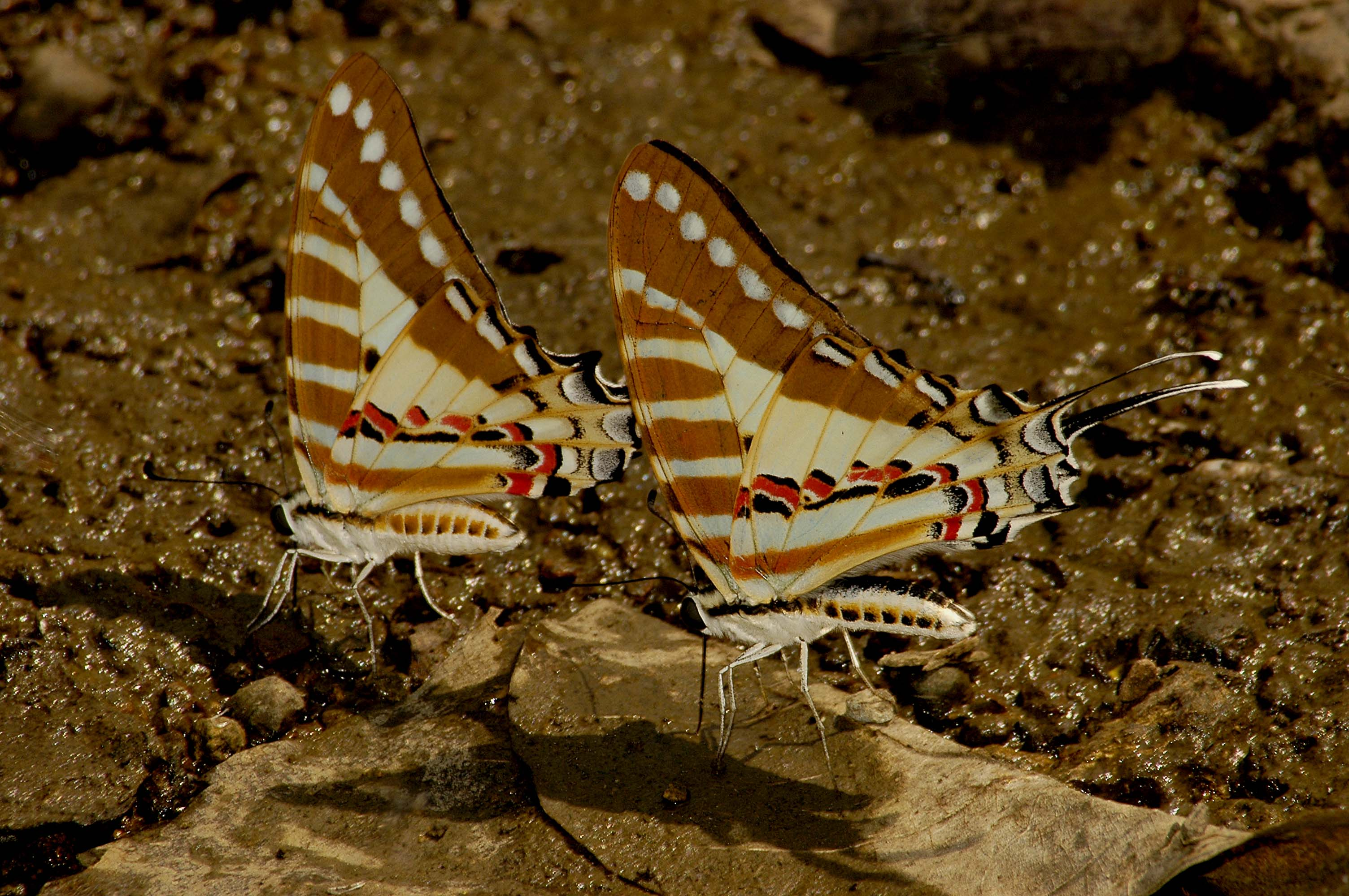 Spot swordtail mudpuddling. Taken in Yewoor